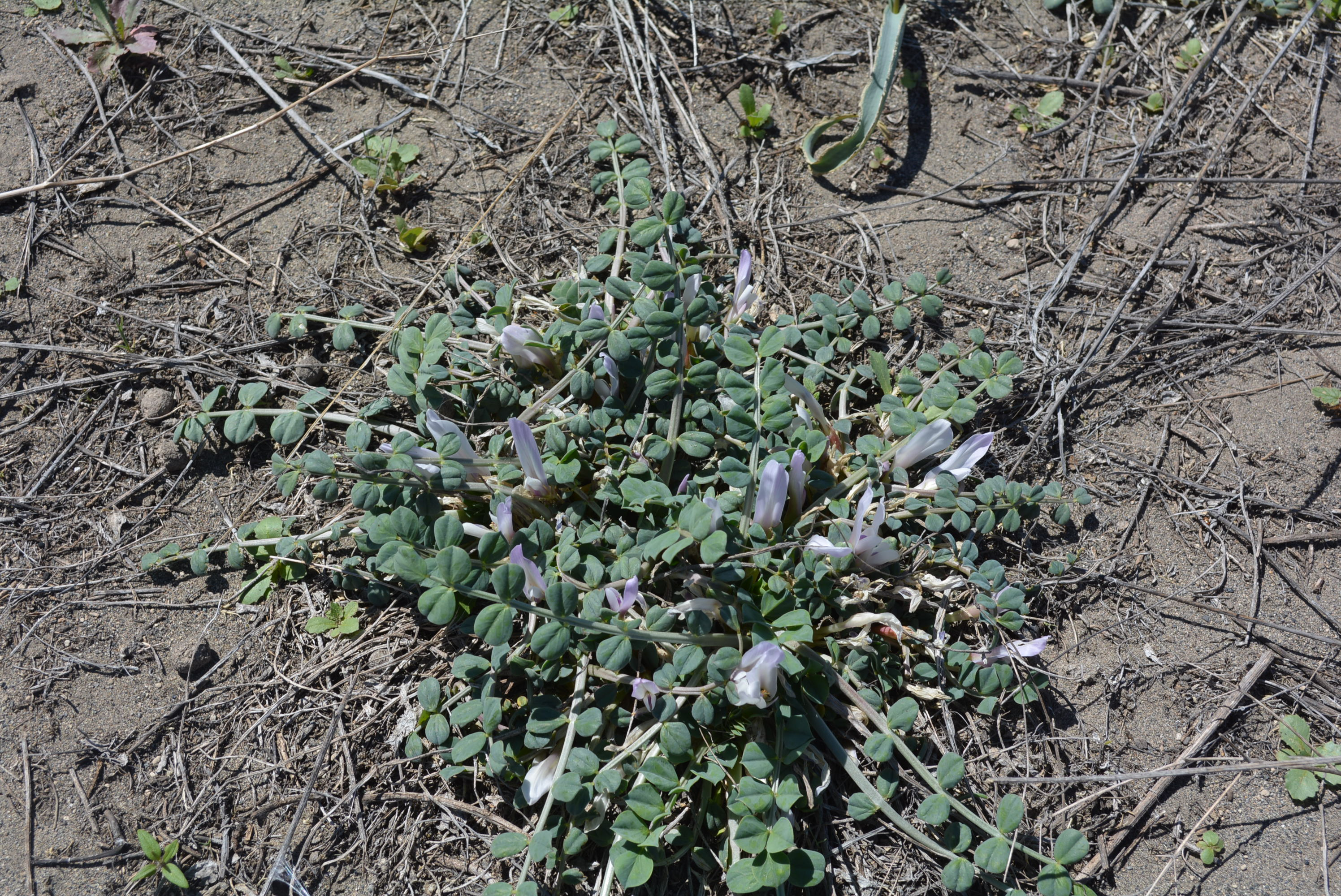 Գոռավանի ավազուտներ